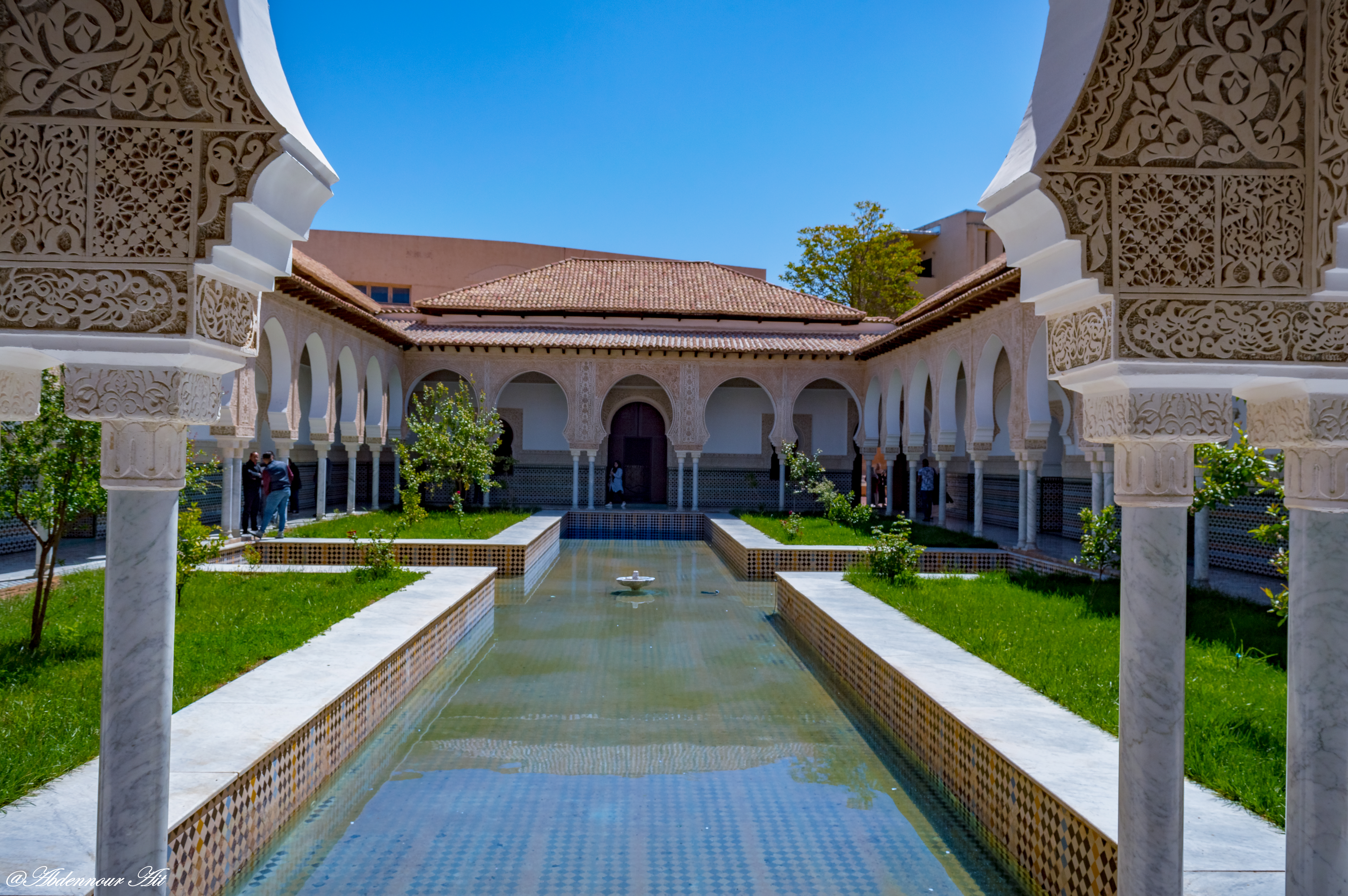 قصر المشور: بنى يغمراسن بن زيان قصر المشور وعمره أوائل القرن الثالث عشر عند مغادرته القصر المرابطي الذي كان موازيا للجامع الأعظم، فقد وصف التنسي منازله الجليلة وحدائقه النضرة، هدم بعض حجراته باي الجزائر، إثر ثورة قام بها التلمسانيون على الحاكمين، ثم قضى على مابقي منها الفرنسيون سنة 1843 هدموه واتخذوه معسكرا إلا أنهم تركوا صومعة قصيرة جميلة تدل على أنه كان للقصر مسجدا .